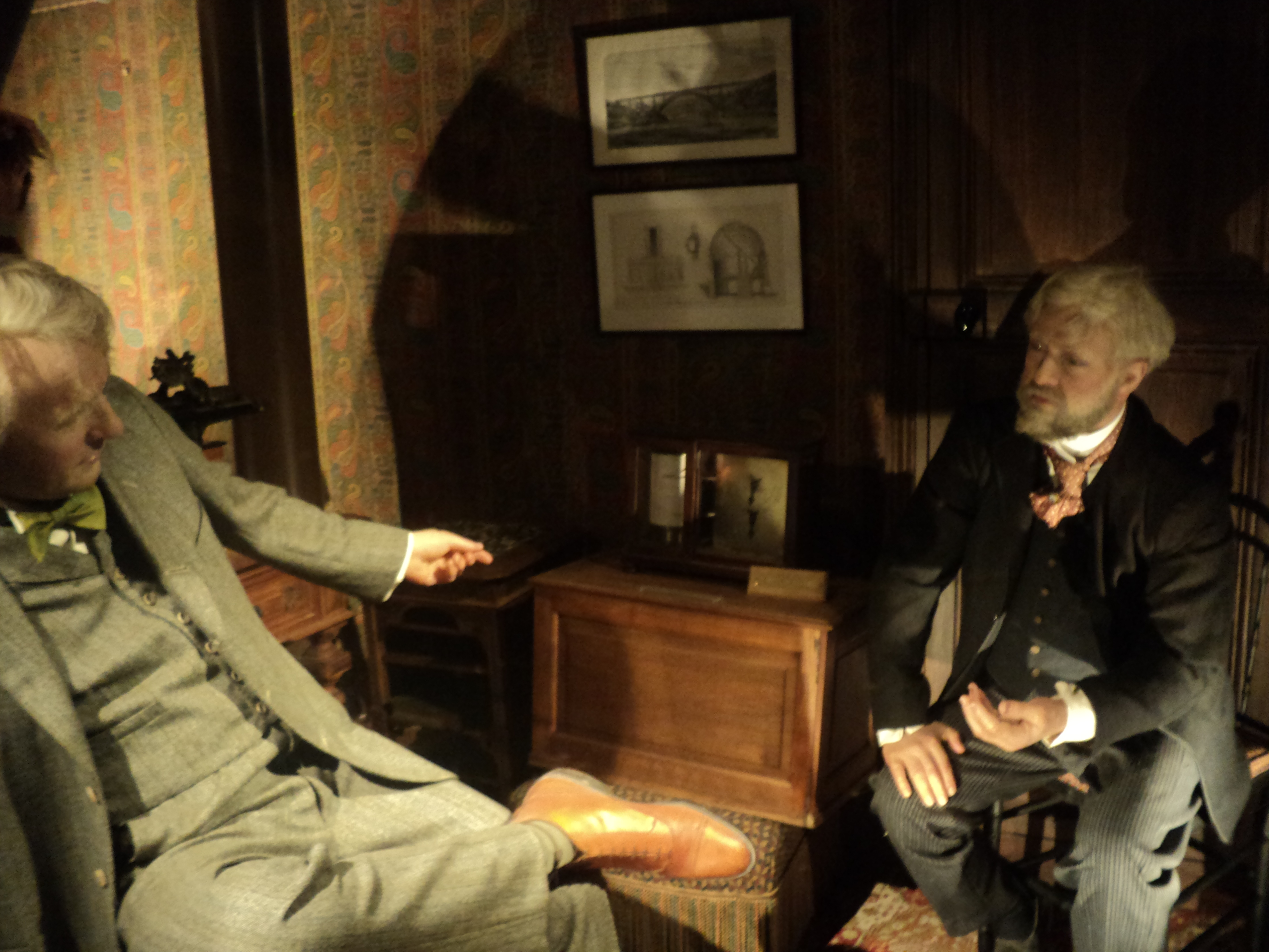 Reconstitution du bureau de Gustave Eiffel montrant l'ingénieur en compagnie de Thomas Alva Edison, troisième étage de la Tour Eiffel, Paris, France